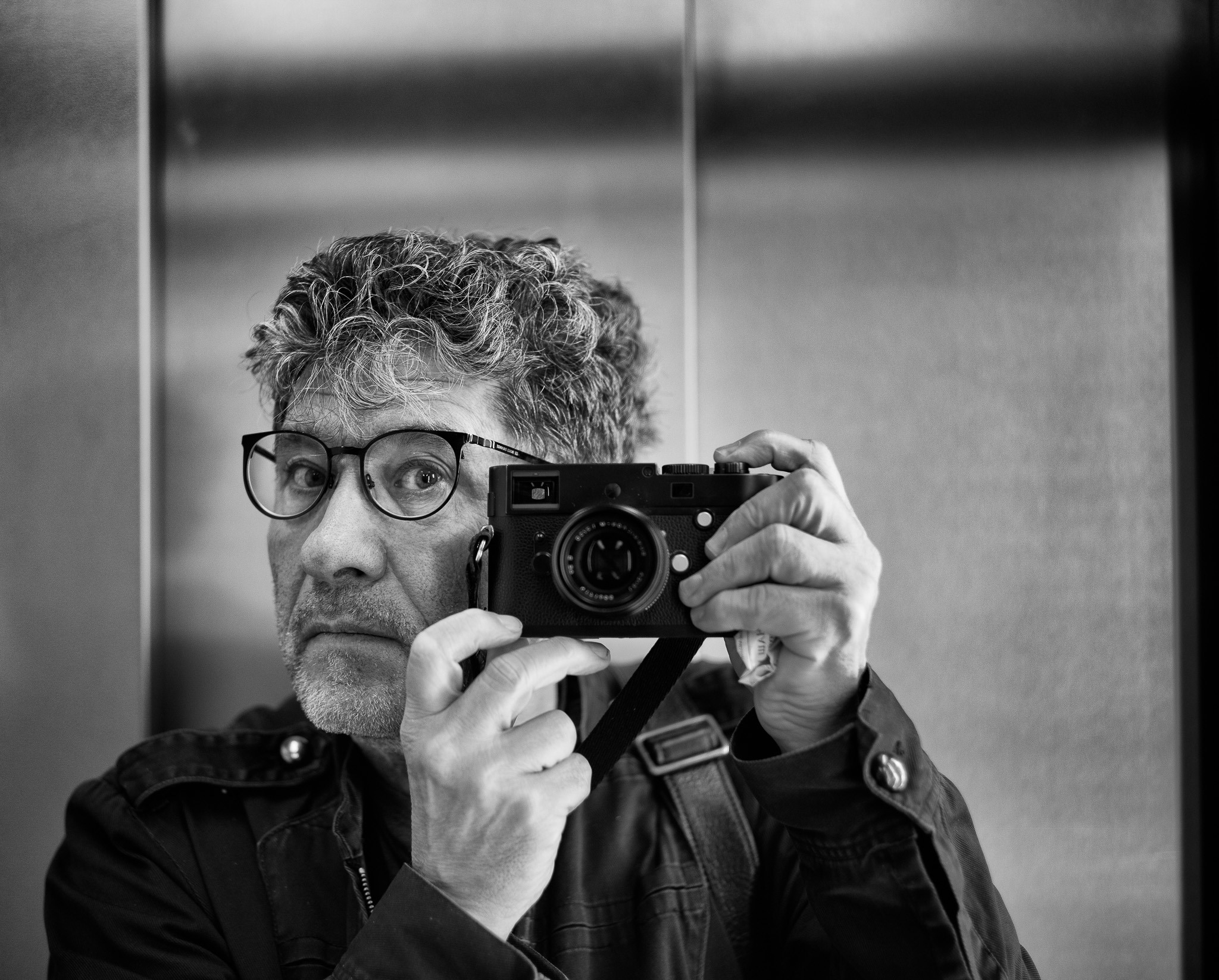 Российский фотограф Игорь Верещагин